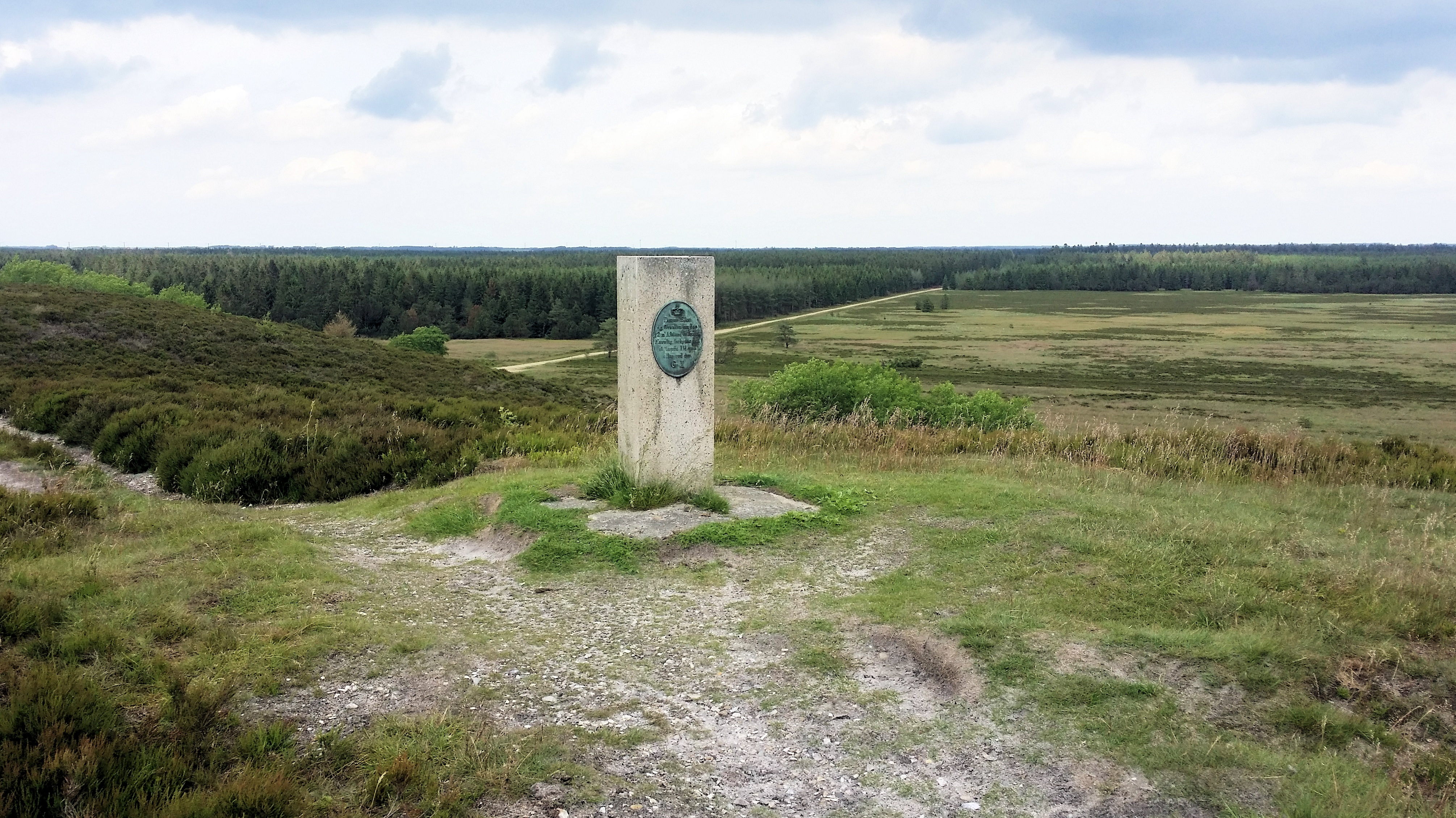 Toppen af Isen Bjerg